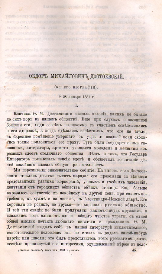 Фёдор Михайлович Достоевский. К его биографии»